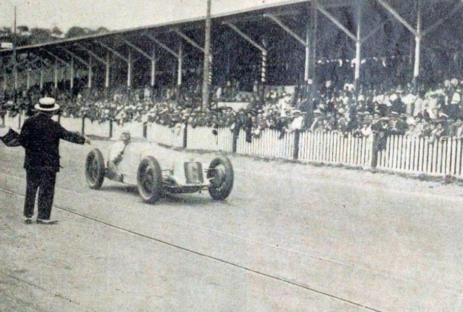 Robert Benoist, vainqueur du Grand Prix d'Espagne 1927 sur Delage 15 S8 1.5L, à Lasarte.